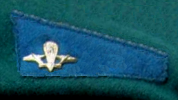 Флажок вдв пв